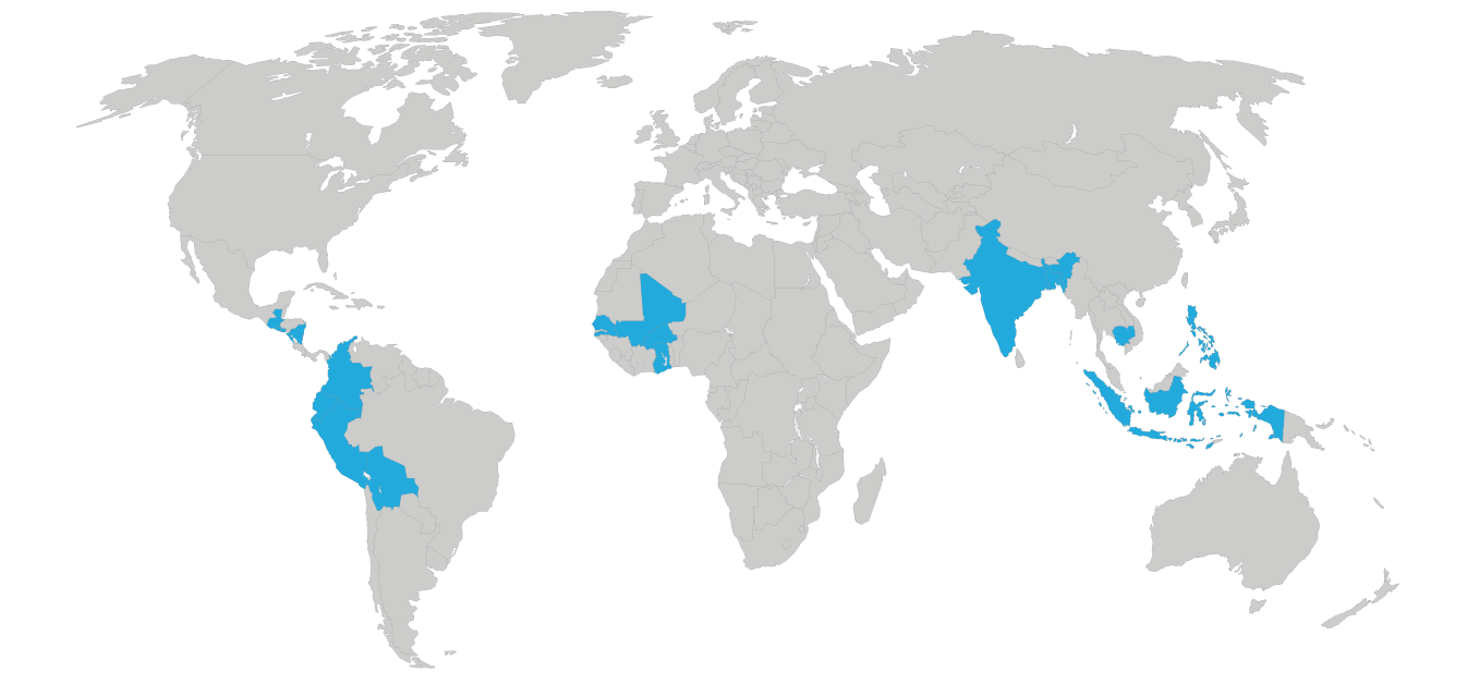 Mapa de los países donde trabaja Intervida